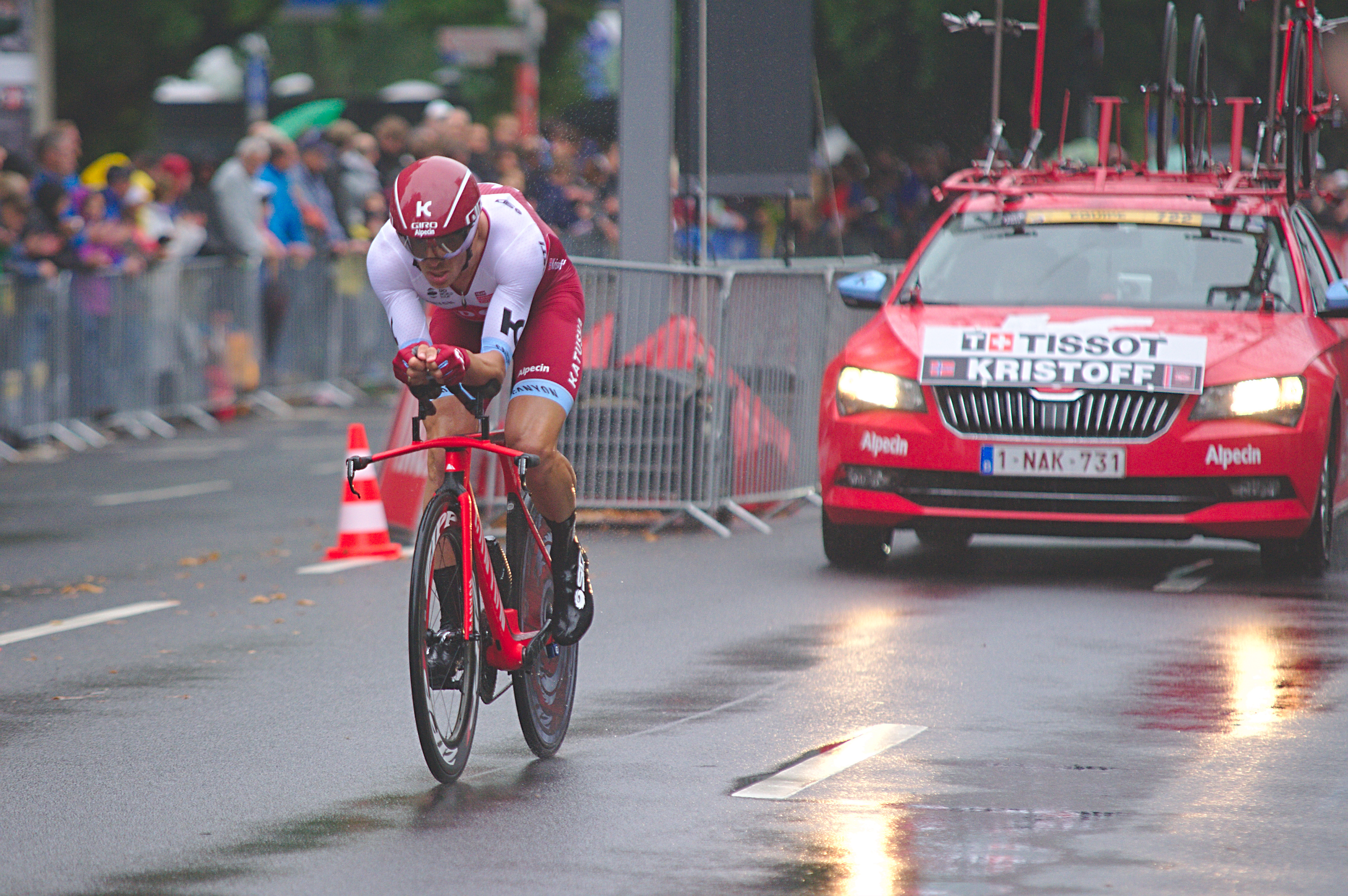 Einzelzeitfahren beim Grand Départ in Düsseldorf, Tour de France 2017: Alexander Kristoff (Katusha-Alpecin)